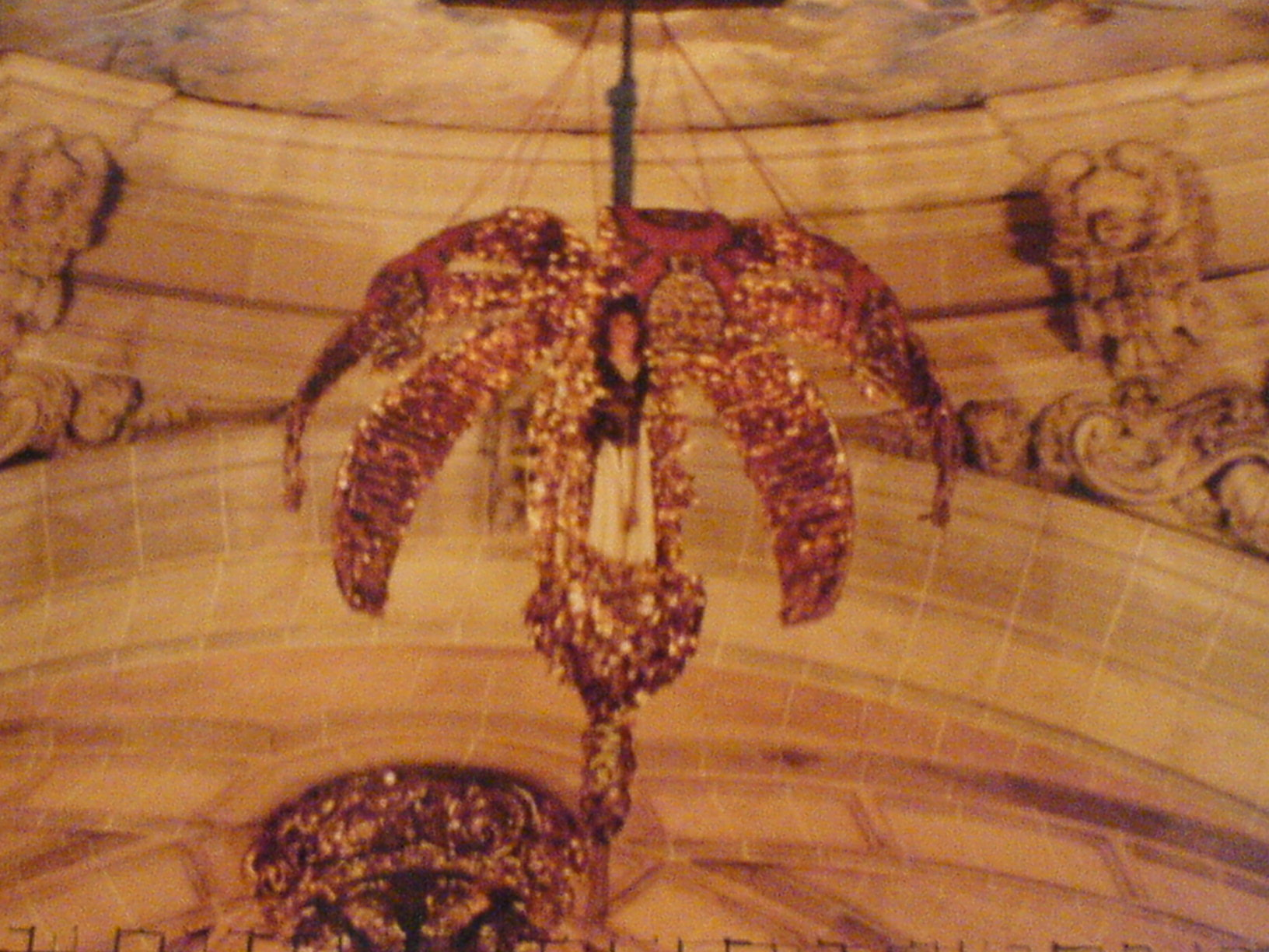 Escena del Misterio de Elche